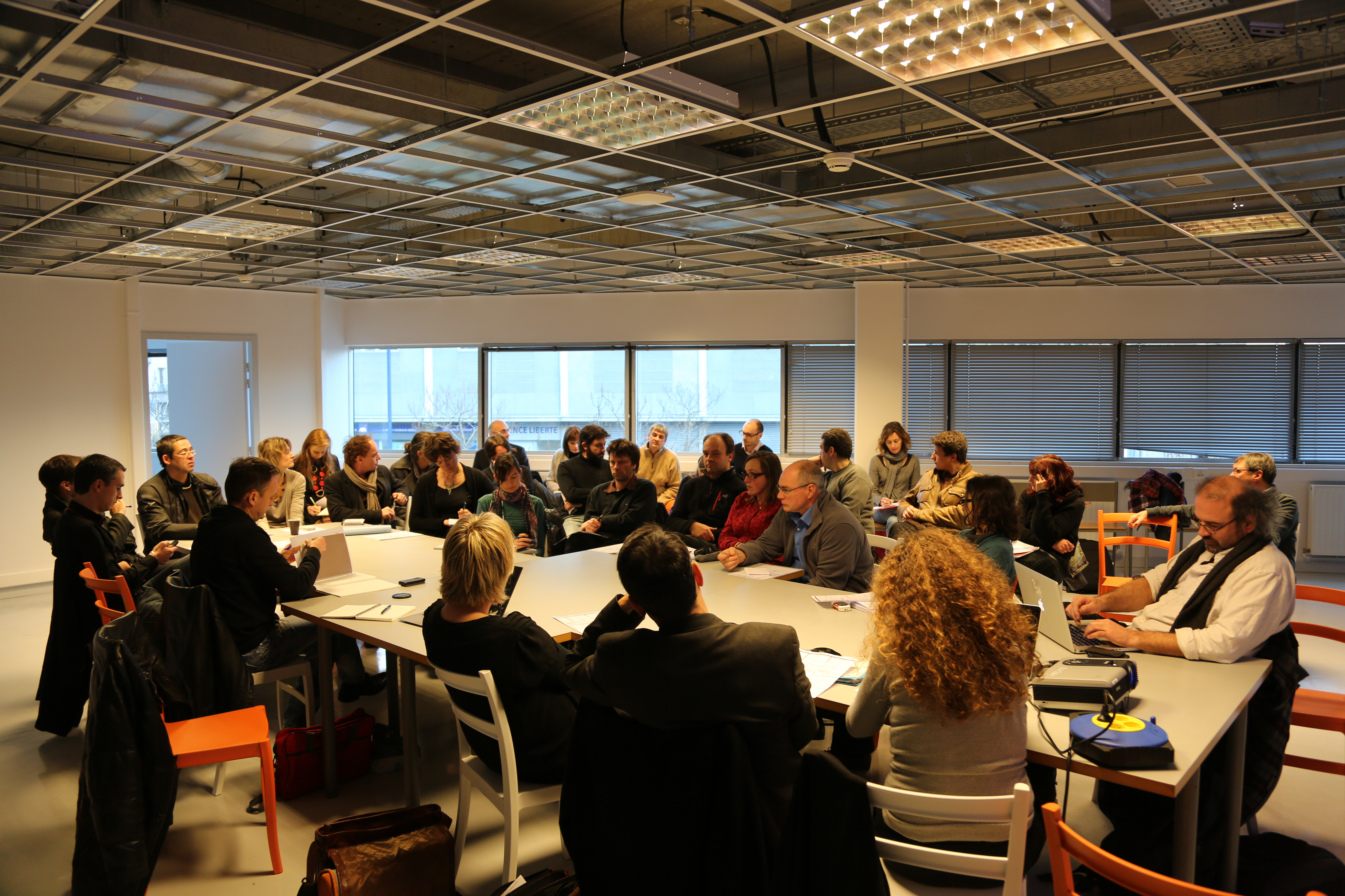 Réunion préparation des ateliers de la cantine